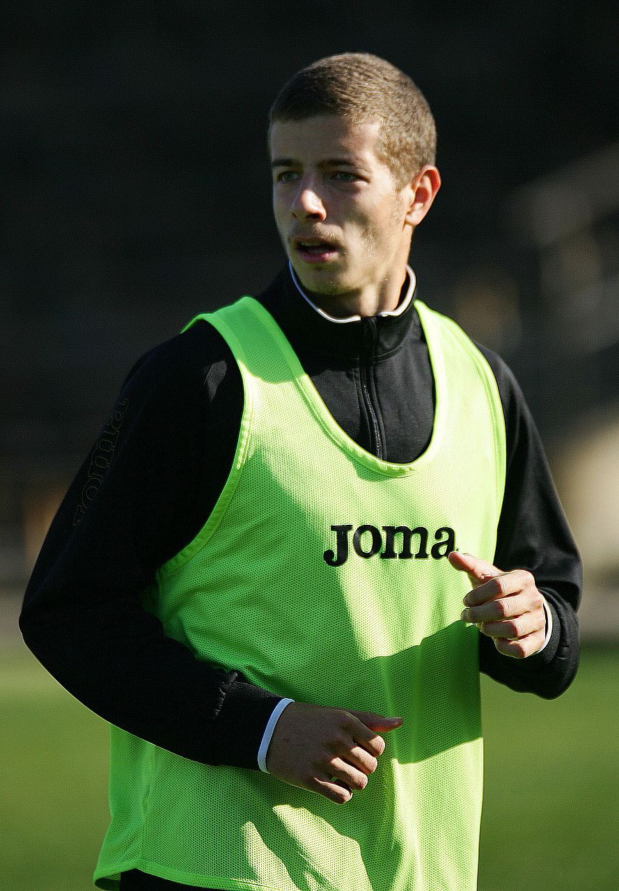 Богомил Христов-български футболист, състезател на ПФК Славия София